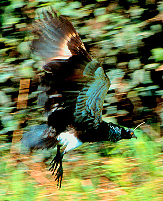 © Leonardo C. Fleck